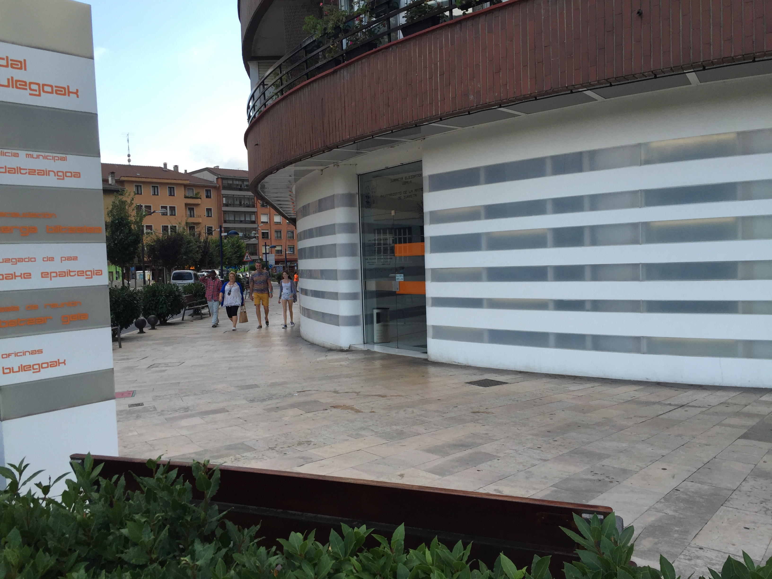 Iurreta Udaleko bulego berriak